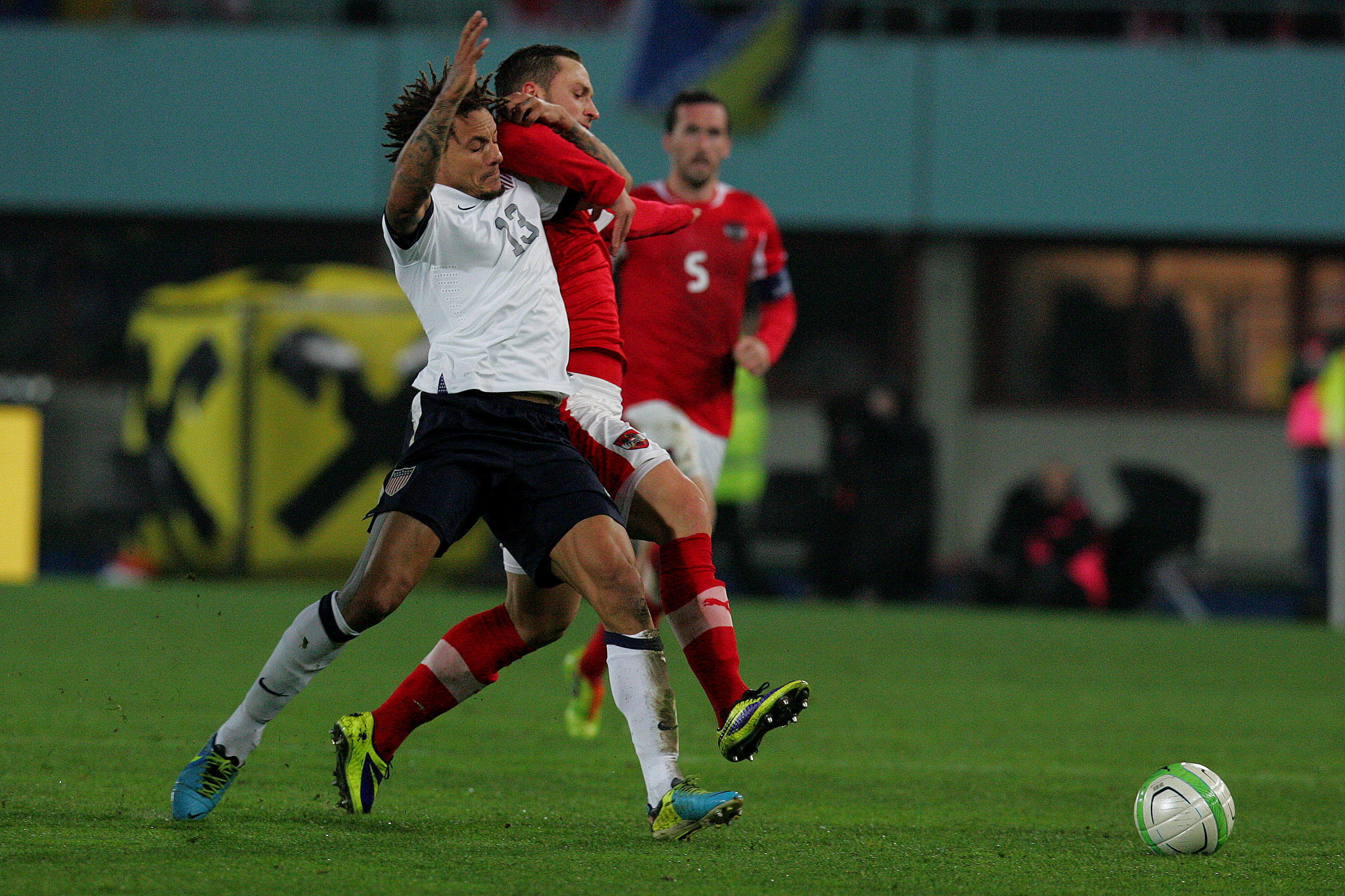 Freundschaftliches Länderspiel Österreich - USA 19.11.2013 in Wien: Jermaine Jones